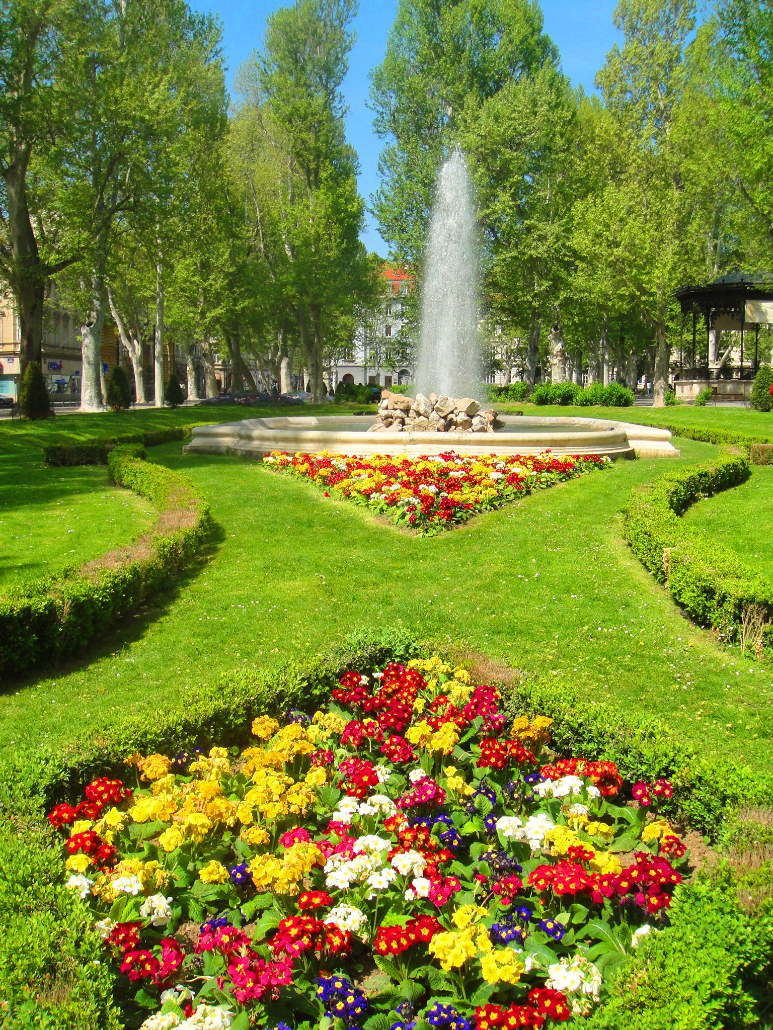 Fountain in park